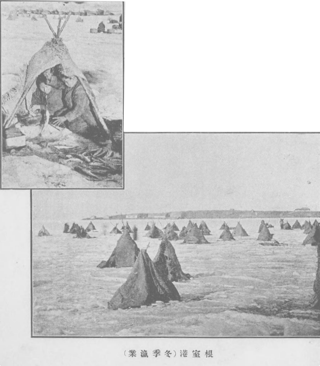 1900年頃の根室港